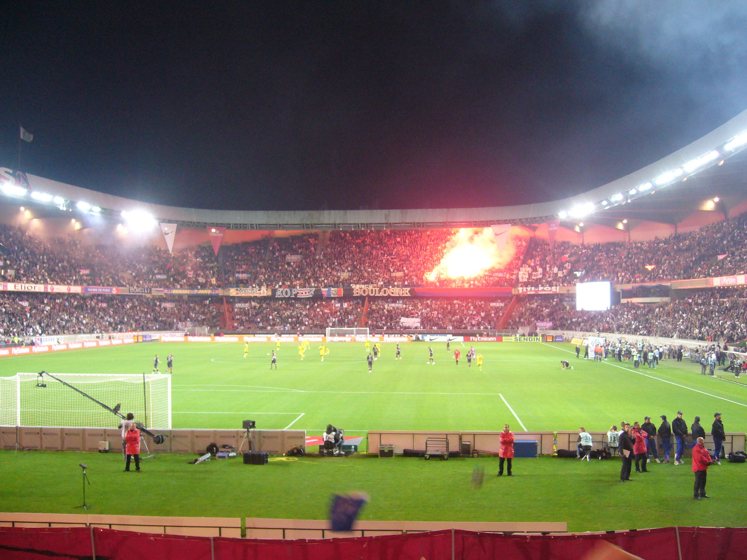 Fumigènes au Kop of Boulogne Paris SG 1-0 FC Nantes, Parc des Princes, 14 Sep 2008, Paris.